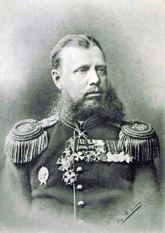 Барон Иоганн-Фридрих-Густав Александрович Аминов (1844—1899) — генерал-лейтенант, участник Туркестанских походов и русско-турецкой войны 1877—1878 годов, Куопиоский губернатор.